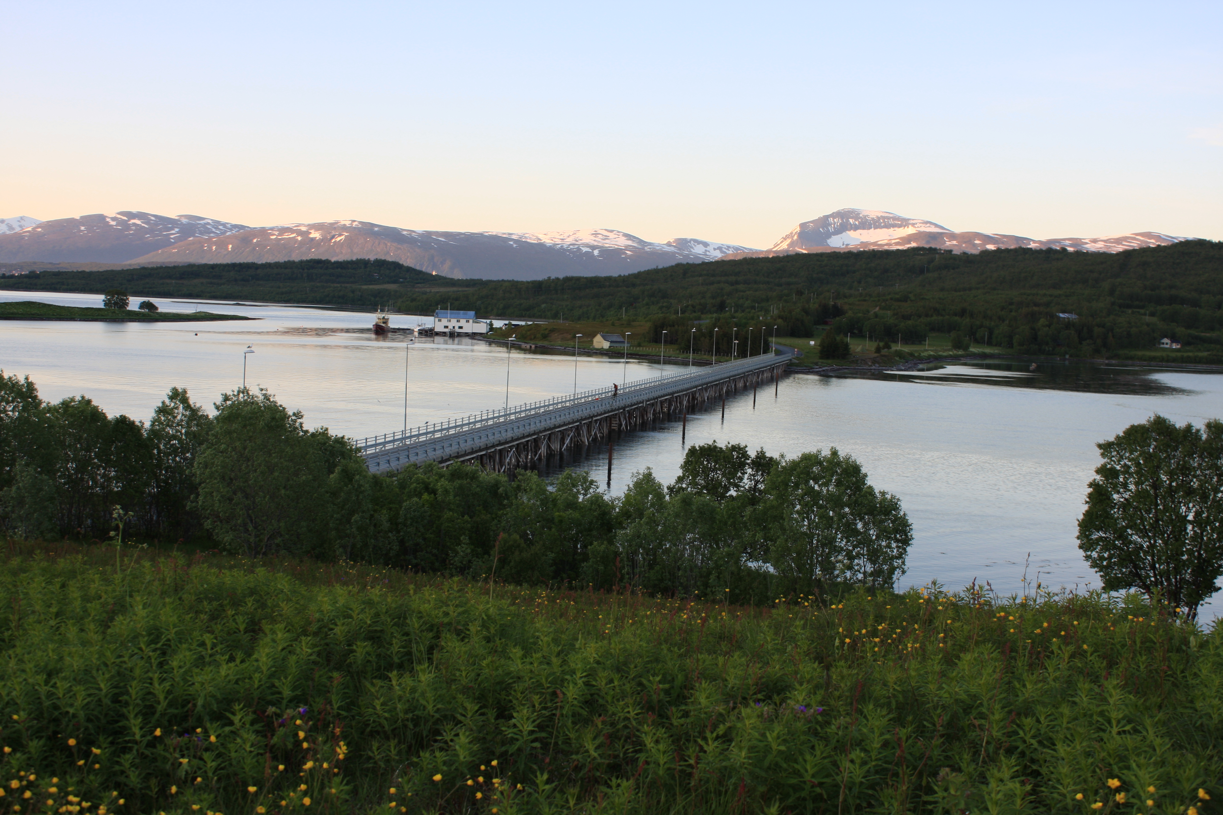 adfadfvafvdasv